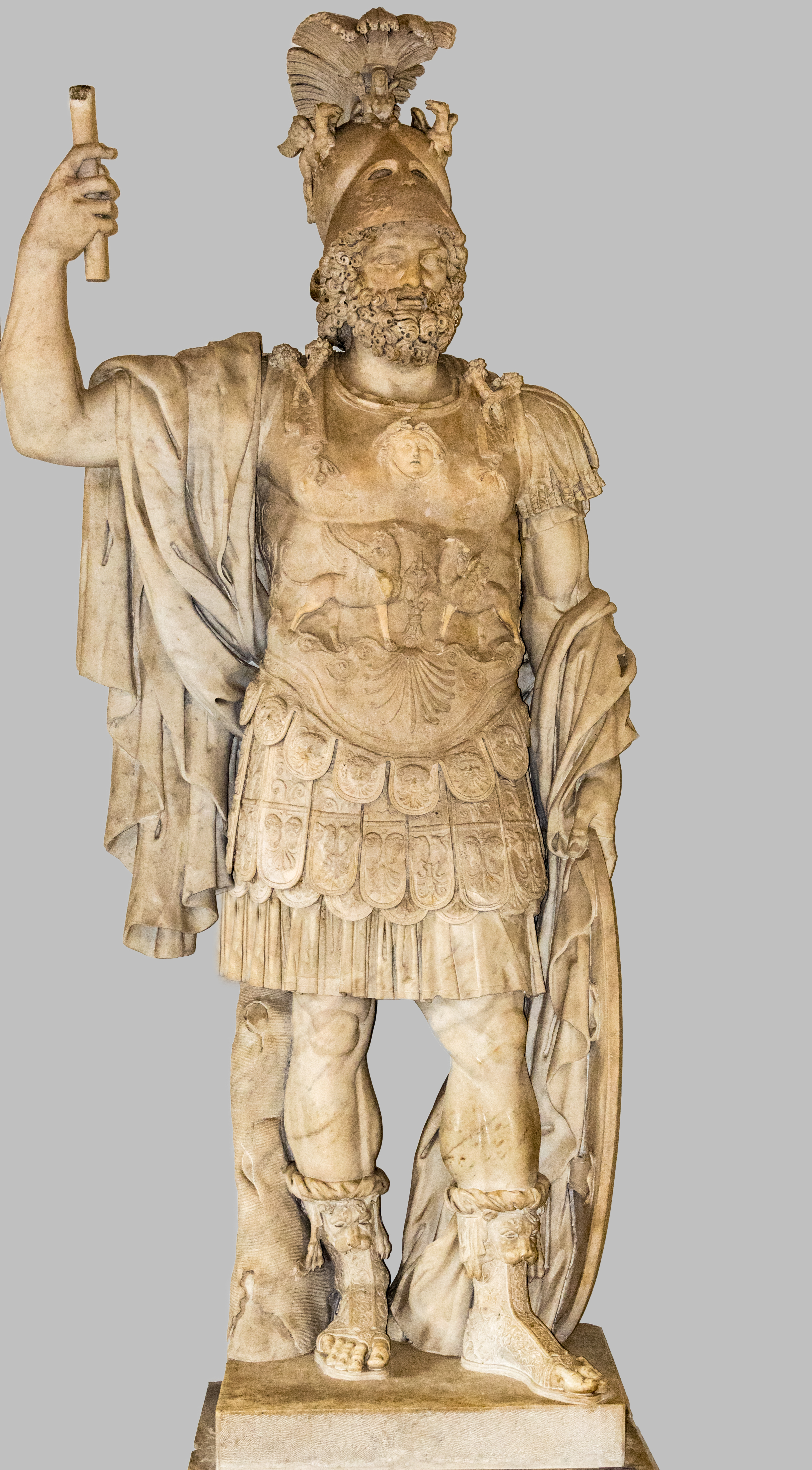 Statue des Mars Ultor (Der Rächer), ausgestellt im Museum Capitolini in Rom. Die Marmorfigur stammt aus dem frühen 2. Jahrhundert und war ursprünglich im Forum Transitorium aufgestellt.